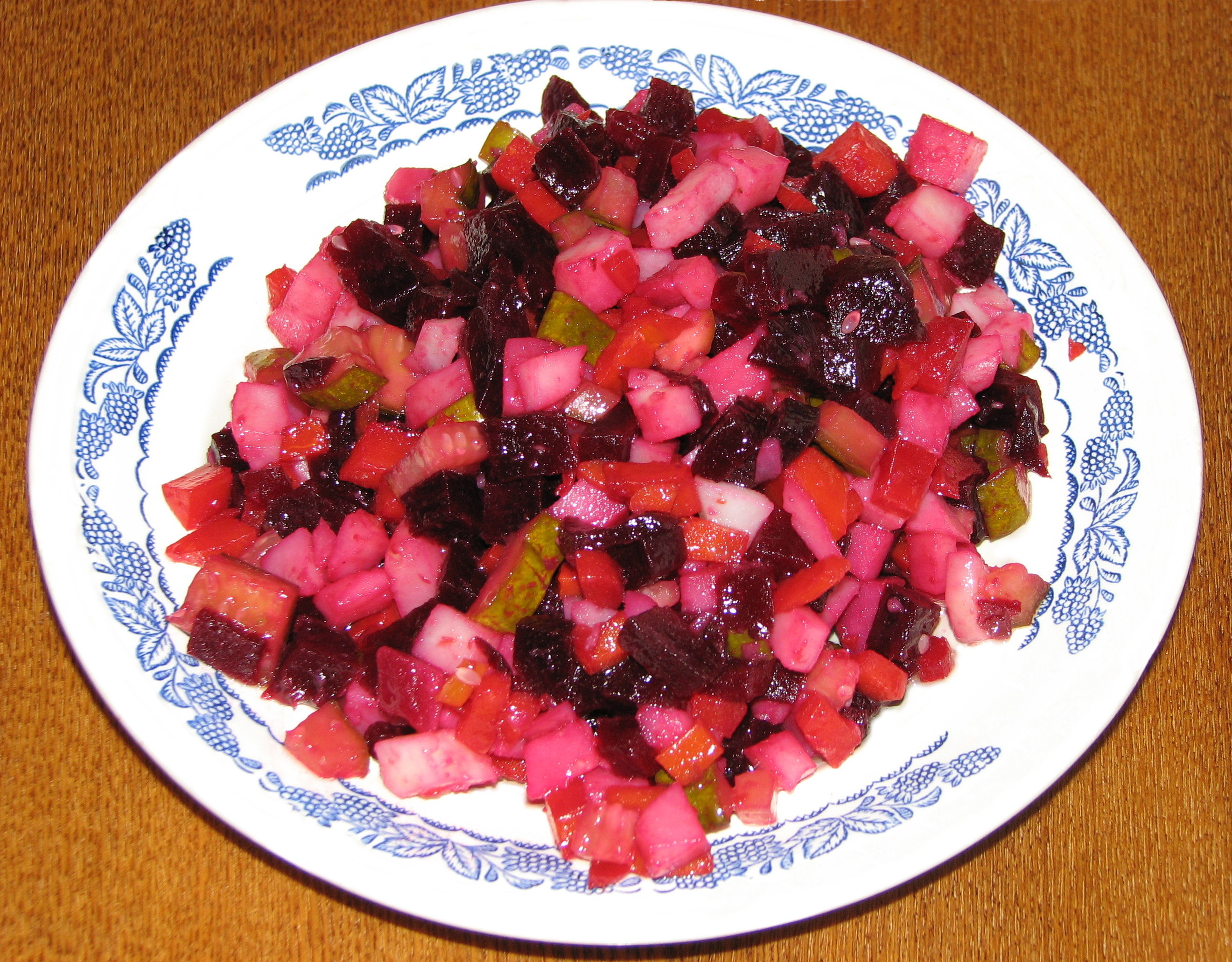 Винегрет